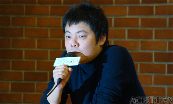 '슬픔보다 더 슬픈 이야기' 현장공개